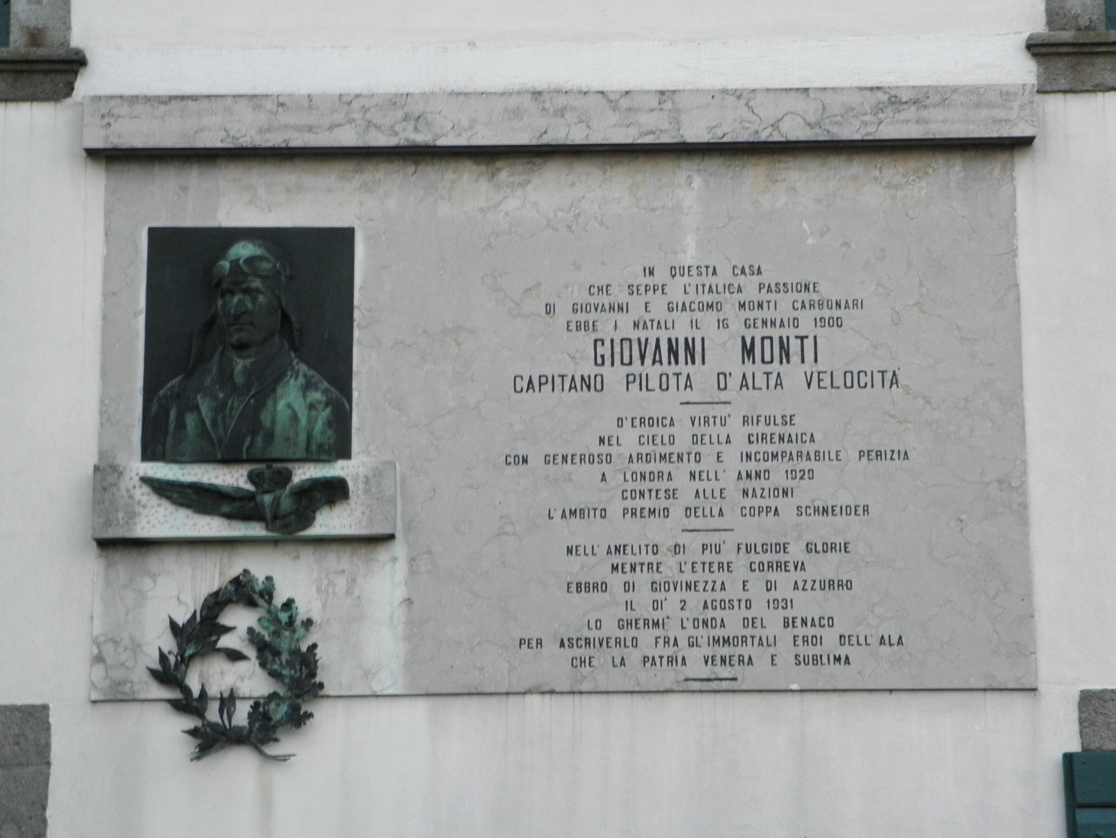 Lapide commemorativa dedicata a Giovanni Monti posta sulla facciata del Palazzo Lippomanno Monti a Fratta Polesine.